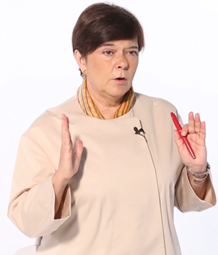 Catedrática y profesora emérita de la Universidad de Navarra